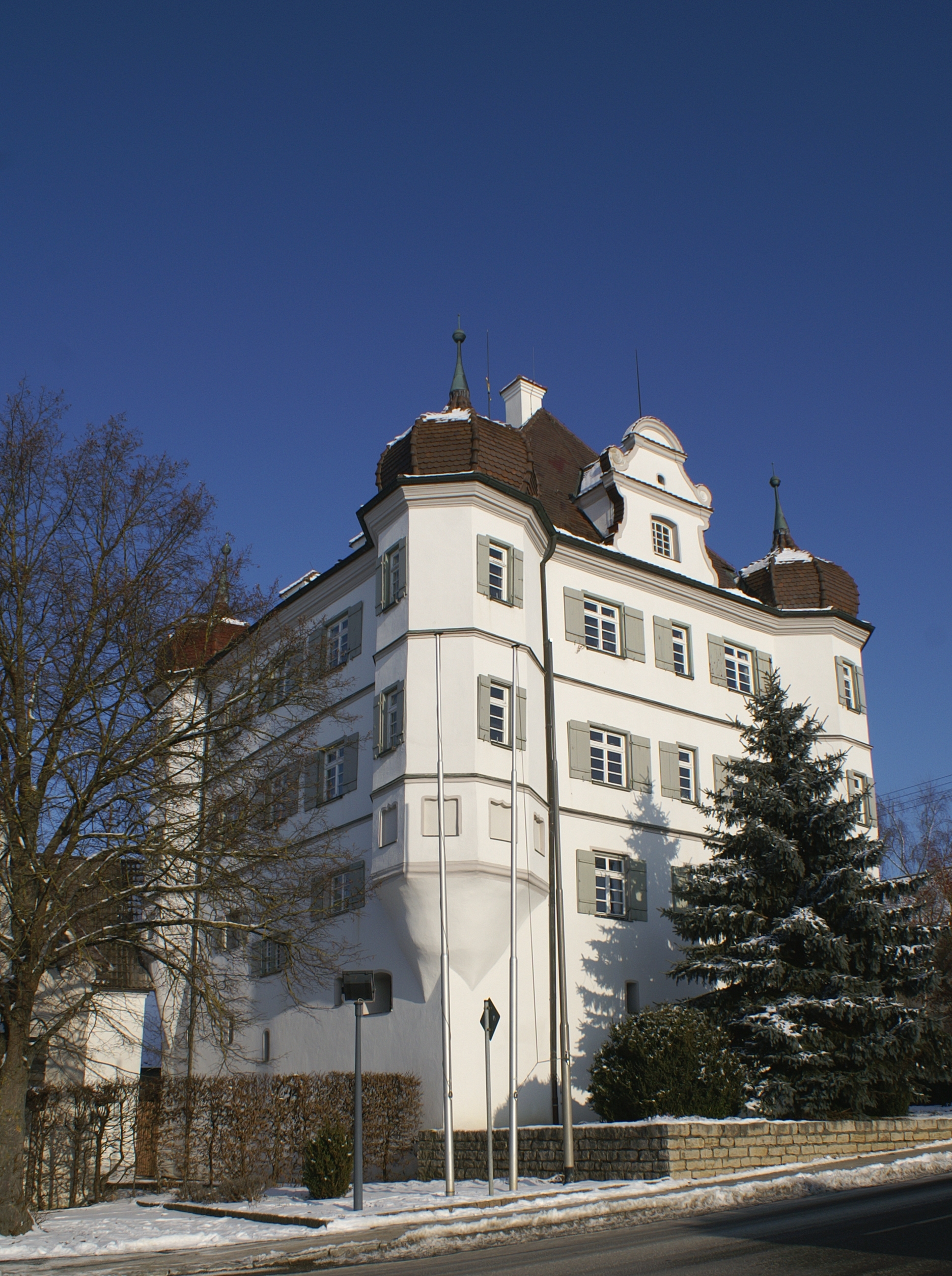 Das Bernstadter Schloss ist Sitz der Gemeindeverwaltung, und es befindet sich dort das Heimatmuseum